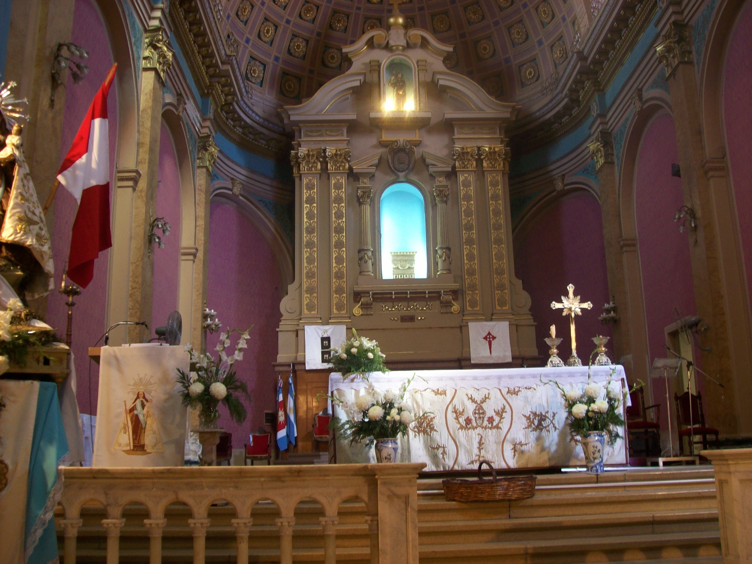 Altar mayor de la Catedral de Santiago del Estero, en la ciudad del mismo nombre, provincia de Santiago del Estero, Argentina.